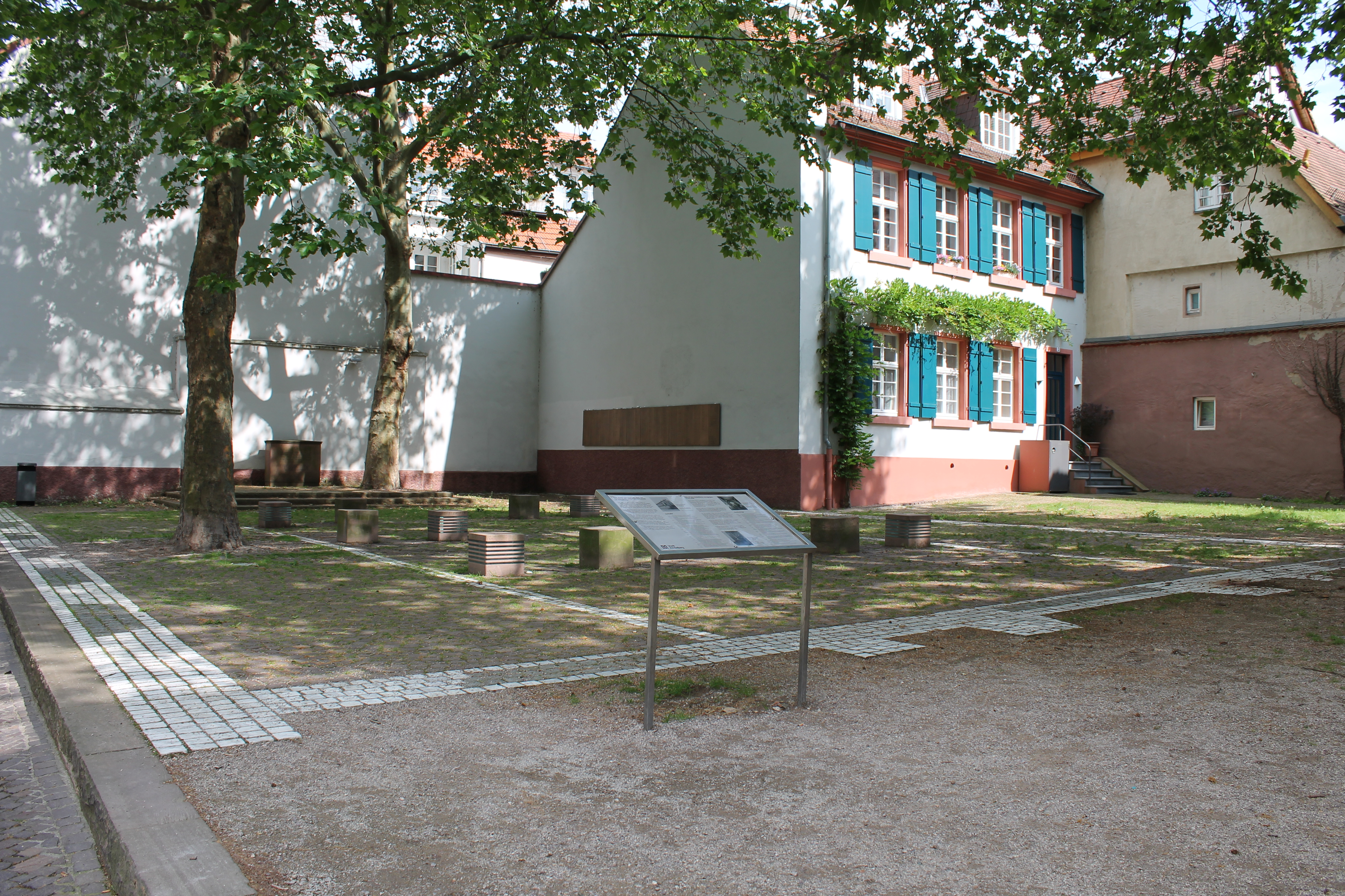 Heidelberger Synagogenplatz